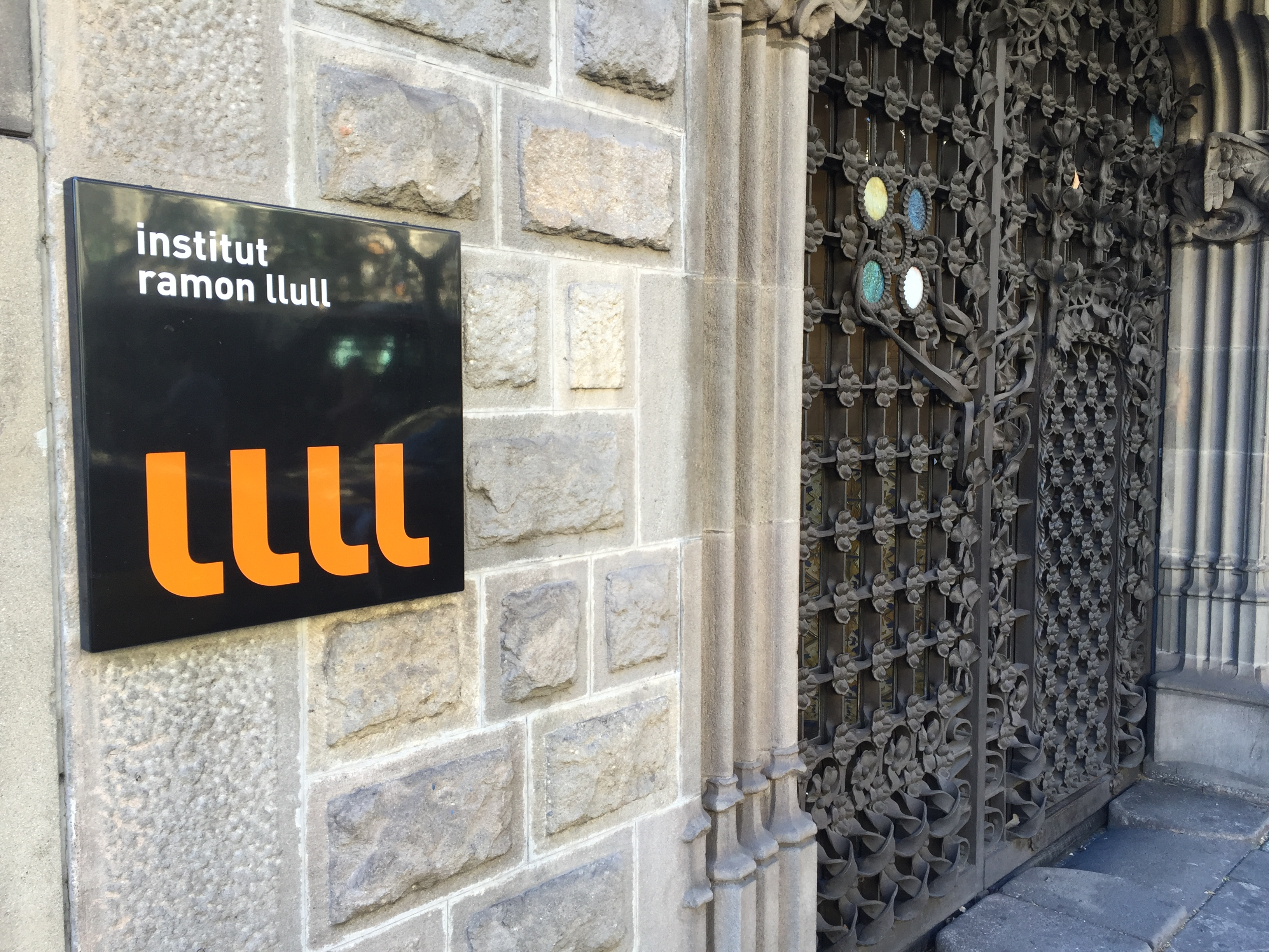 IRL entrada palau baró quadras